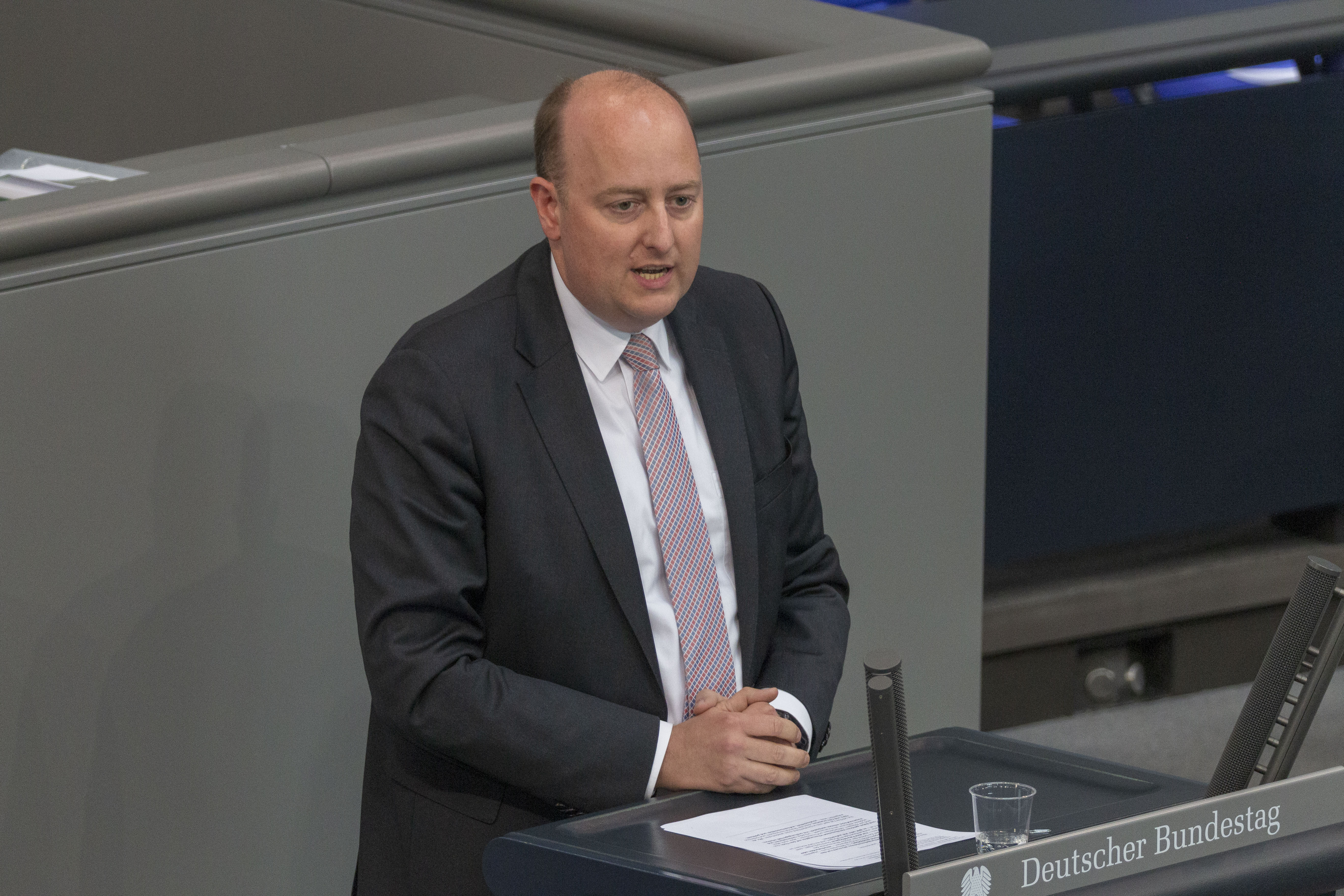 Matthias Hauer, Bundestagsabgeordneter der CDU während der Plenarsitzung des Deutschen Bundestages am 2. Juli 2020 in Berlin.